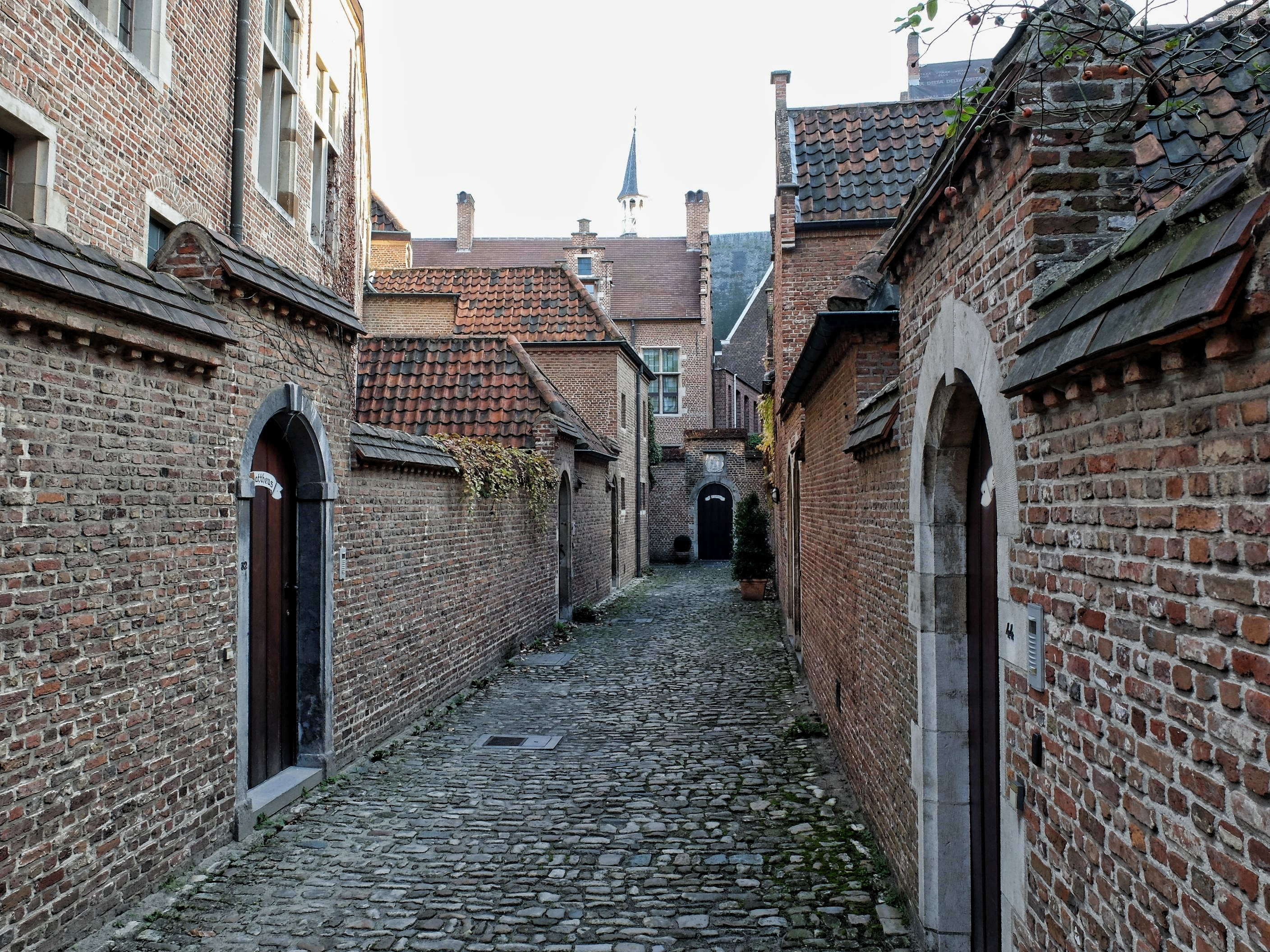 Begijnhof Antwerpen Rodestraat